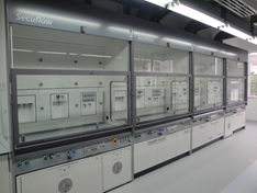 Frente con 3 vitrinas de gases